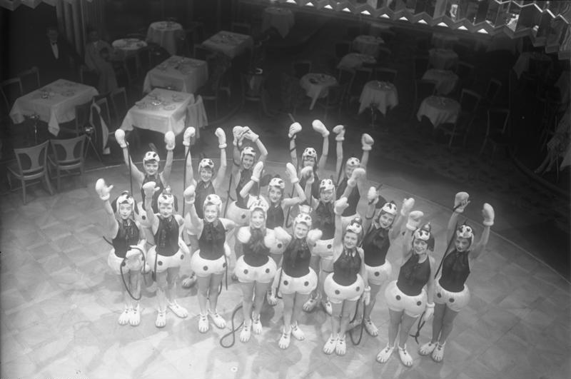 Der Siegeszug der Micki-Maus! Micki-Maus-Revue-Girls während eines Berliner Gastspiels.